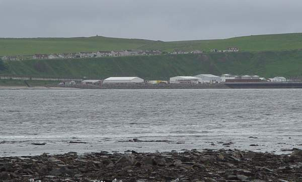 Thurso, Blick auf Scrabster